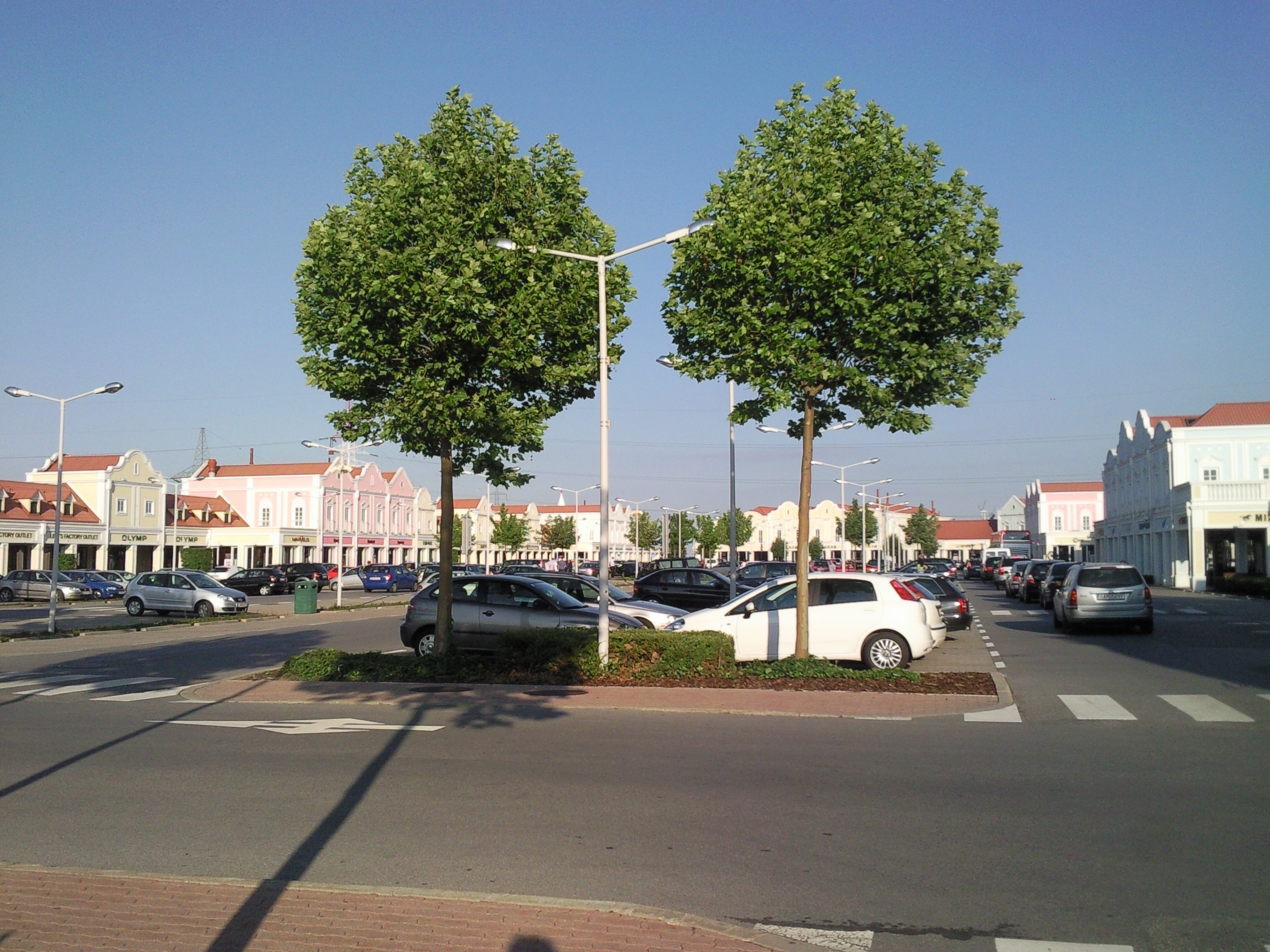 Parndorf